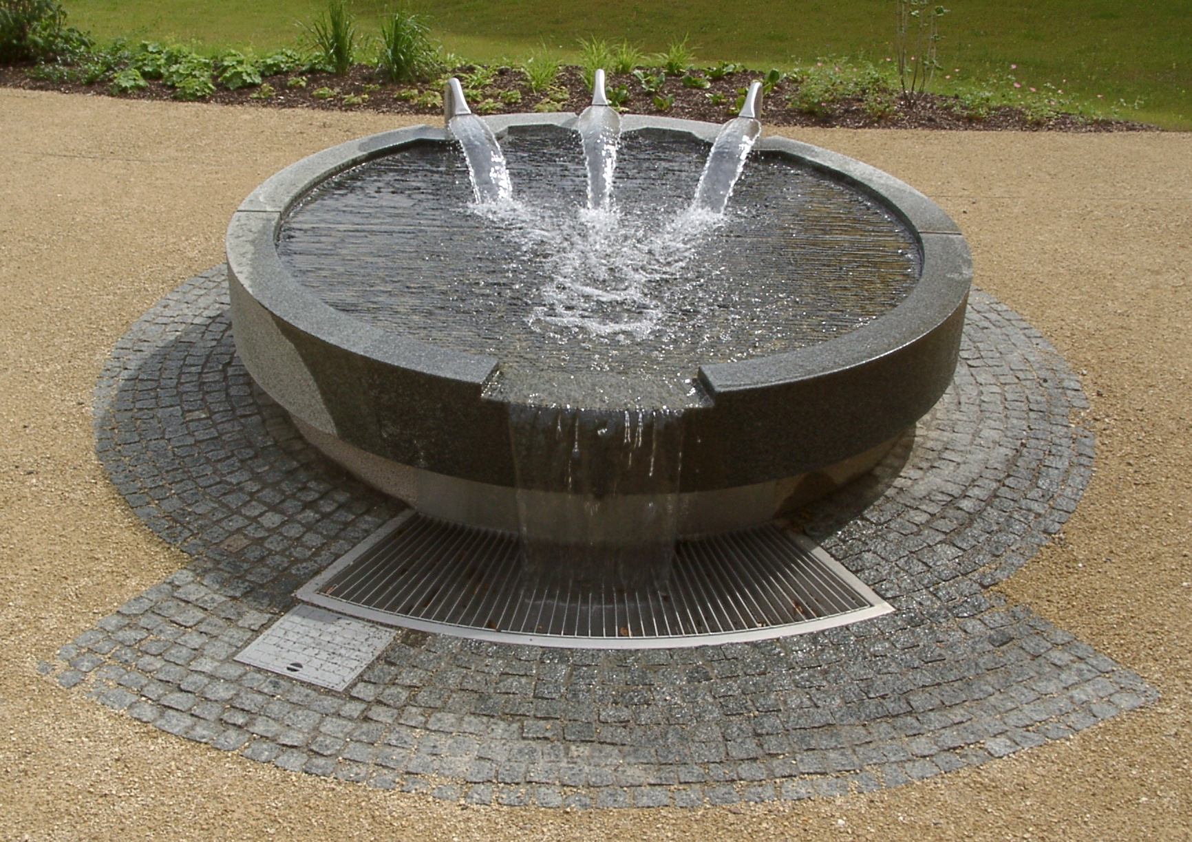 Wasserspiel im Patientengarten von Haus B im Krankenhaus Dresden-Friedrichstadt, Schale und Kleinpflaster aus Soraer Lamprophyr